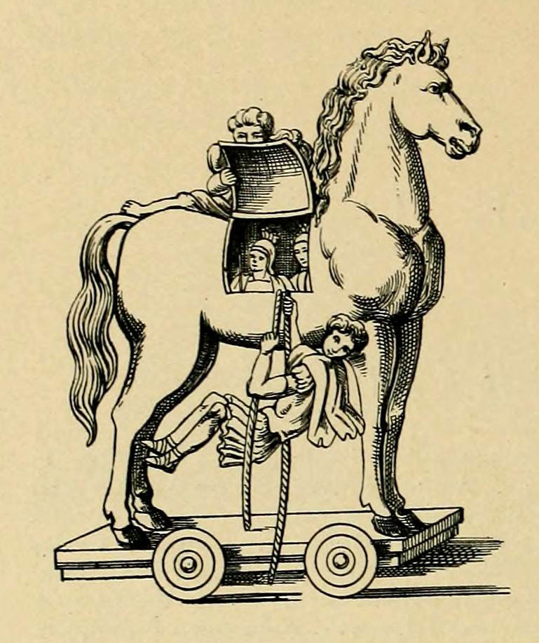 Illustration from Histoire des jouets